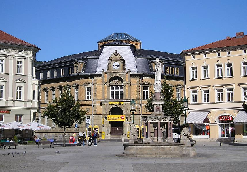 Das Hauptpostamt und Heinrichsbrunnen in Meiningen